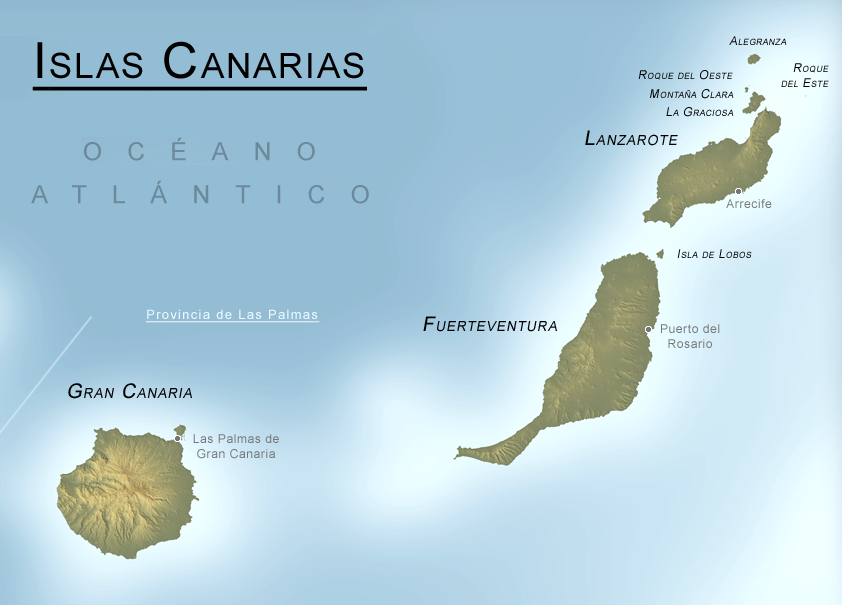 Provincia de Las Palmas